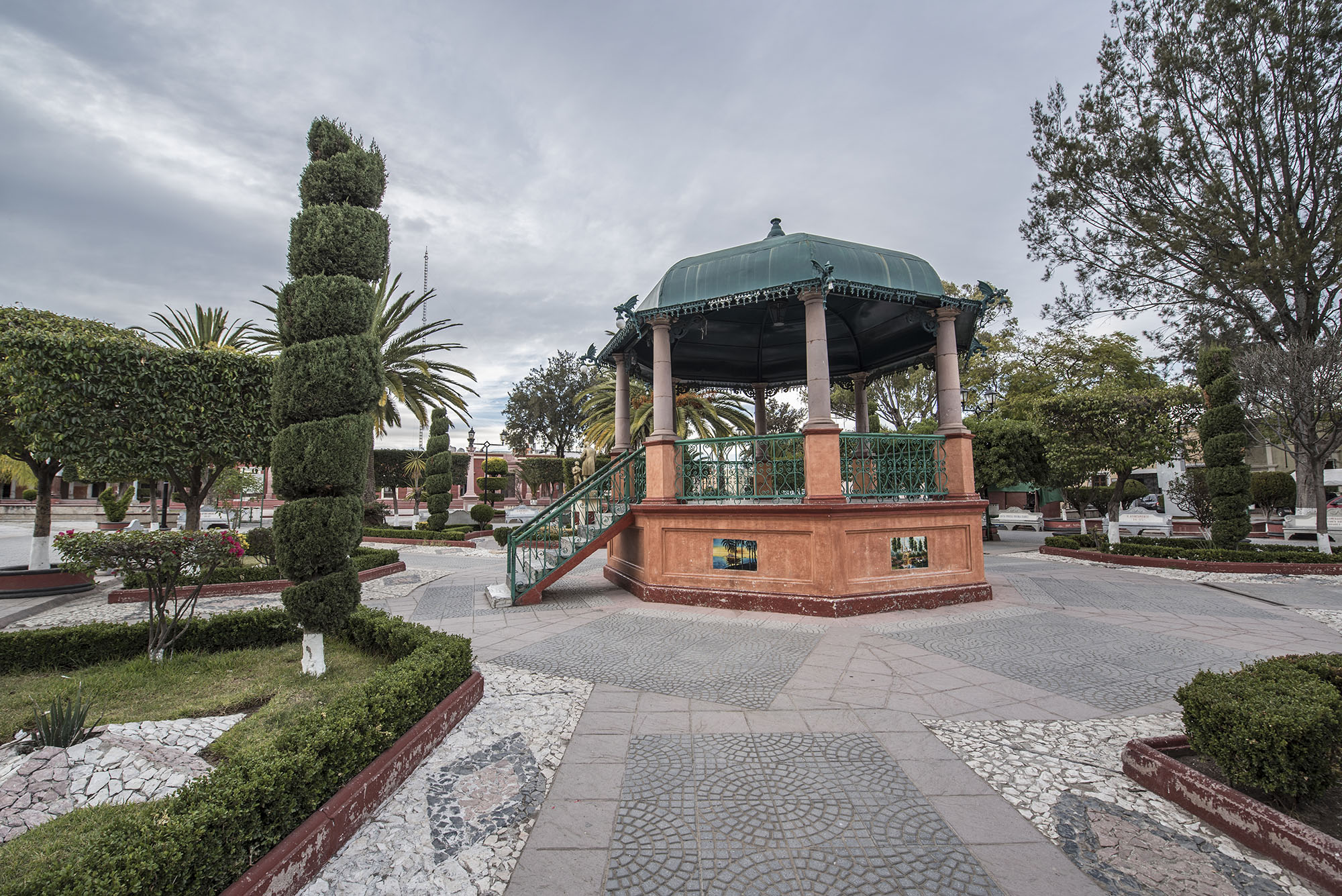 Pueblo Cadereyta